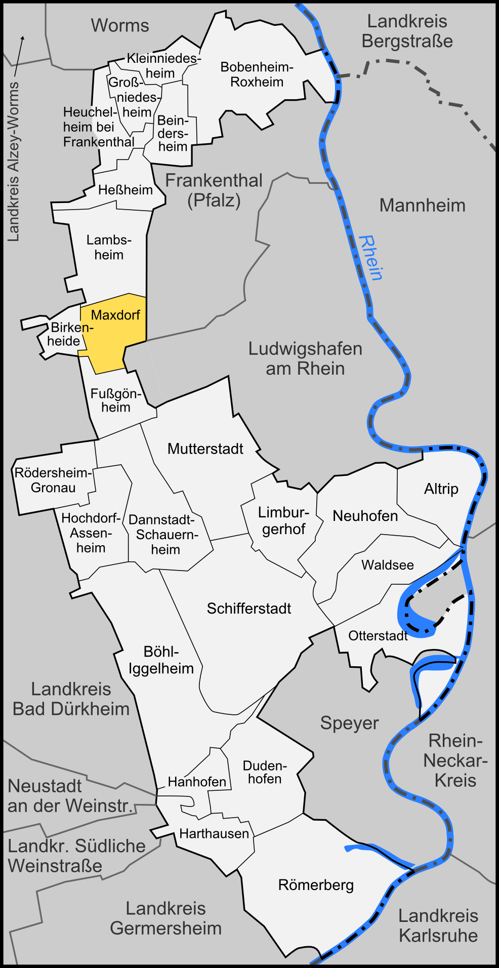 Karte der Gemeinde Maxdorf im Rhein-Pfalz-Kreis